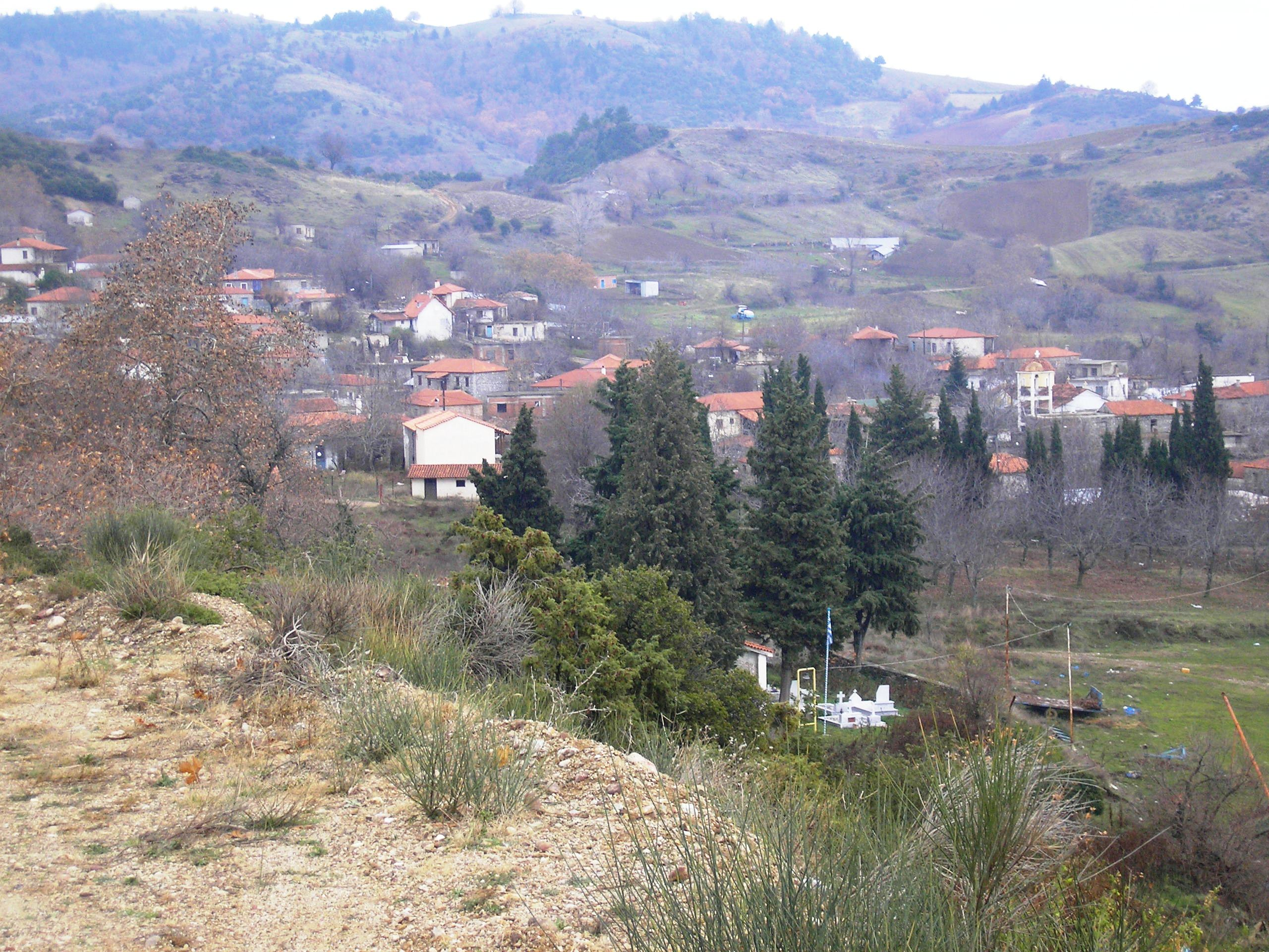 Πανοραμική άποψη της Καρυάς